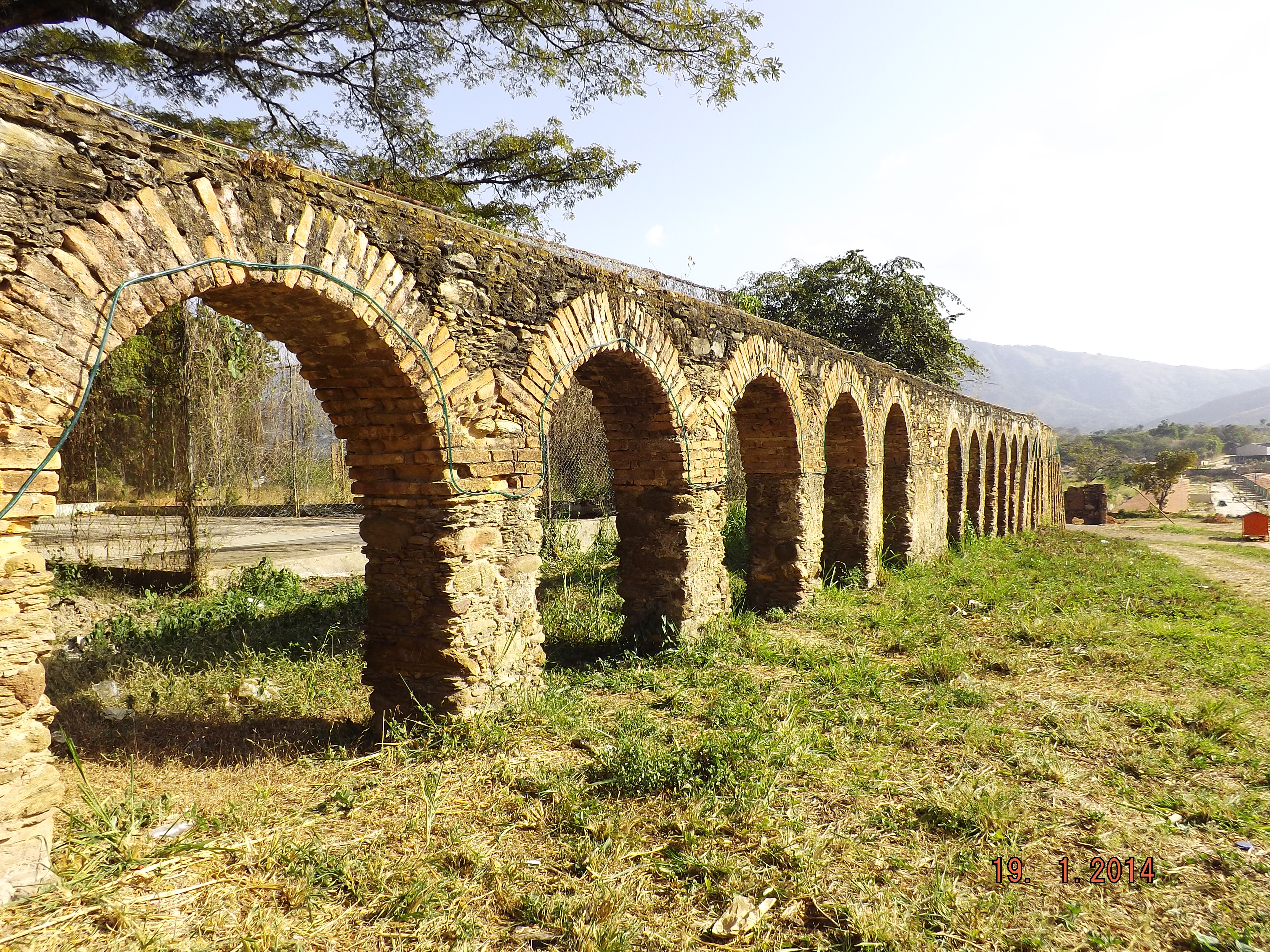 Antiguo Acueducto Hacienda Tiquire Flores se remonta al siglo XVII. Tiene acceso por la carretera nacional hacia La Victoria e igual a la población de El Consejo, en Paso Real de Tiquire Flores. Desde allí se puede apreciar somos un conjunto de arcadas del acueducto colonial, considerada la obra de ingeniería hidráulica del Valle de Aragua y de la Provincia de Caracas, construido de piedra, ladrillo y mampostería, producidos todos con materiales cuyas fuentes se encuentran en los alrededores del lugar. También se puede apreciar en el lugar el Trapiche de caña de Tiquire Flores, hasta donde llegan los 32 arcos que convergen en fila inclinada.